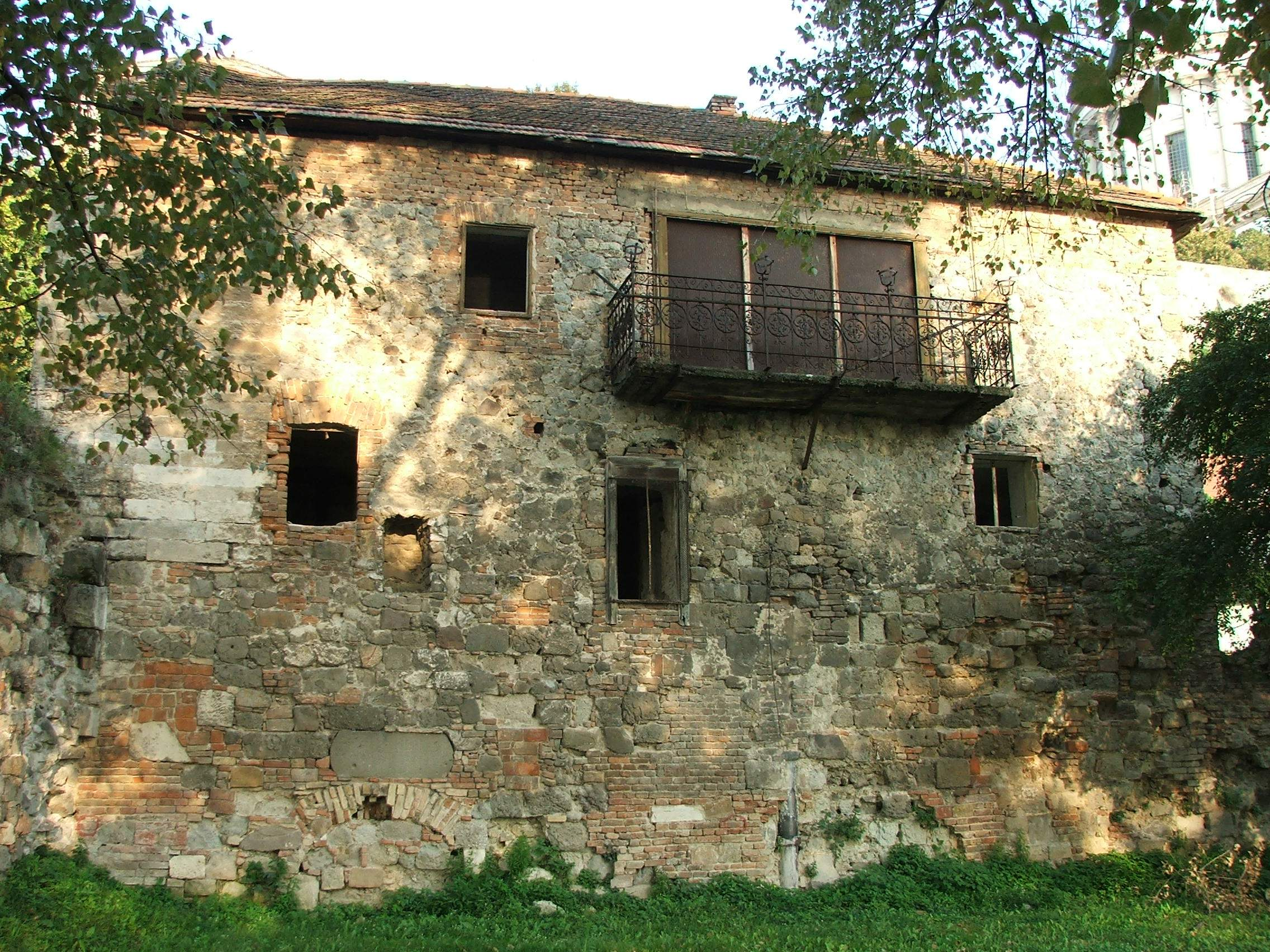 Mosque in Esztergom